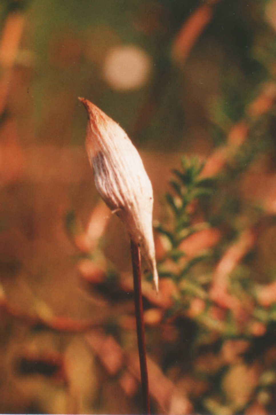 Płonnik jałowcowaty - sporofit: puszka przykryta charakterystycznym białawym czepkiem. Lokalizacja: las mieszany, Puszcza Augustowska (Polska)